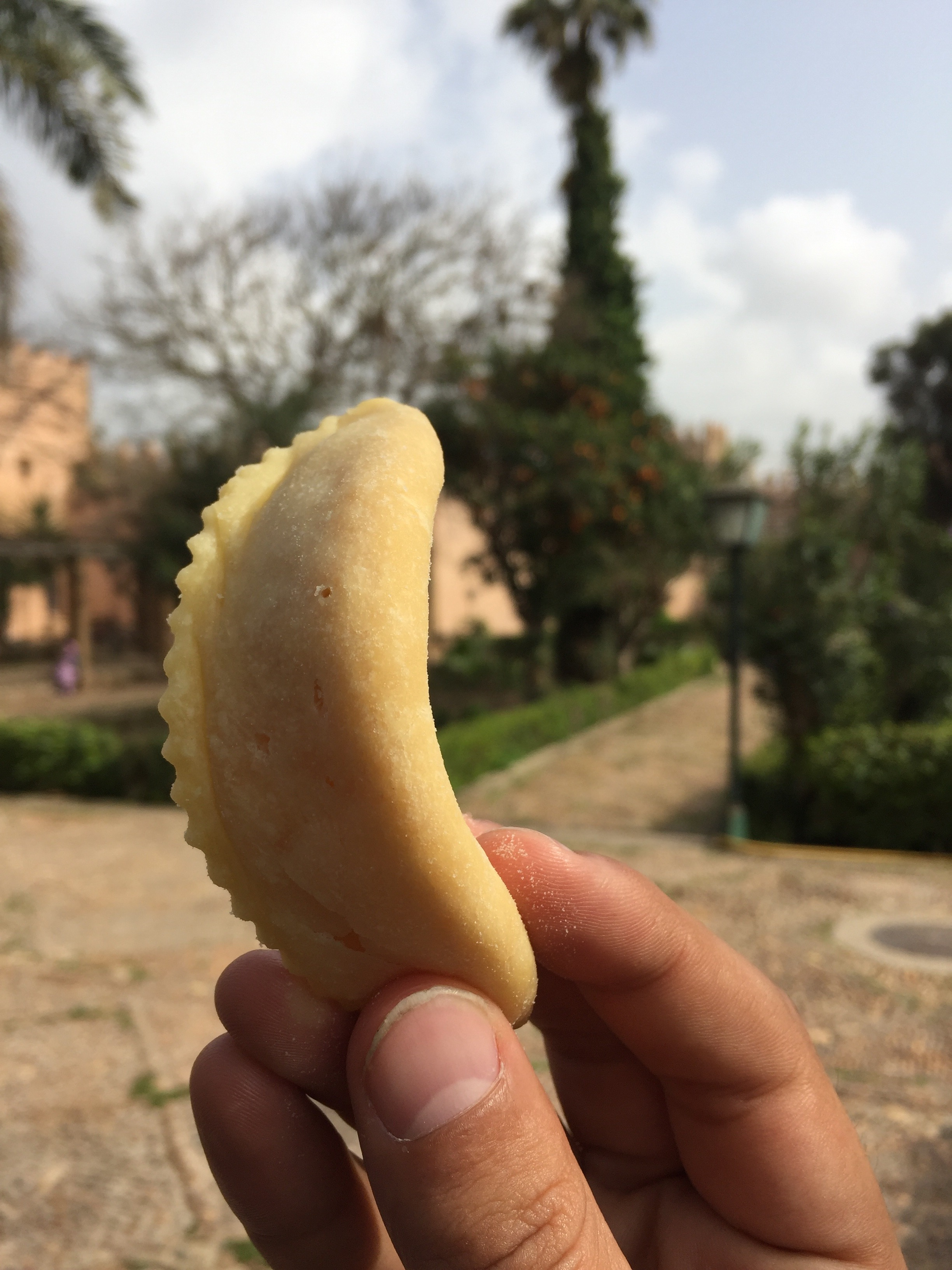 كعب الغزال في قصبة الودايا